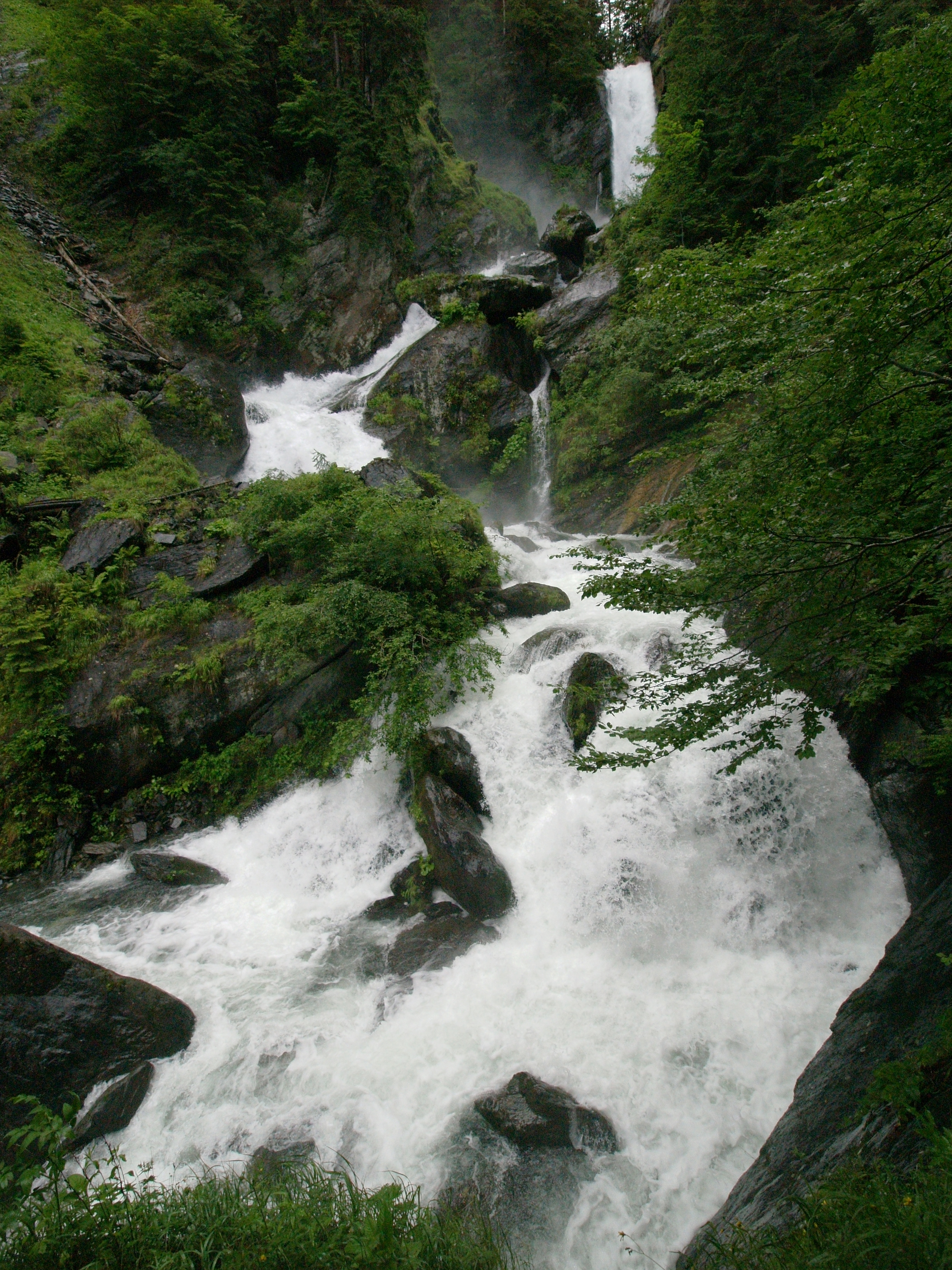 Der Weidenburger oder Kronhofer Wasserfall oder genauer gesagt der Felsen mit einer Höhe von 20 m ist ein Naturdenkmal und liegt im Kronhofgraben; Kanrischer Hauptkamm, Kärnten This media shows the natural monument in Carinthia with the ID He 01.